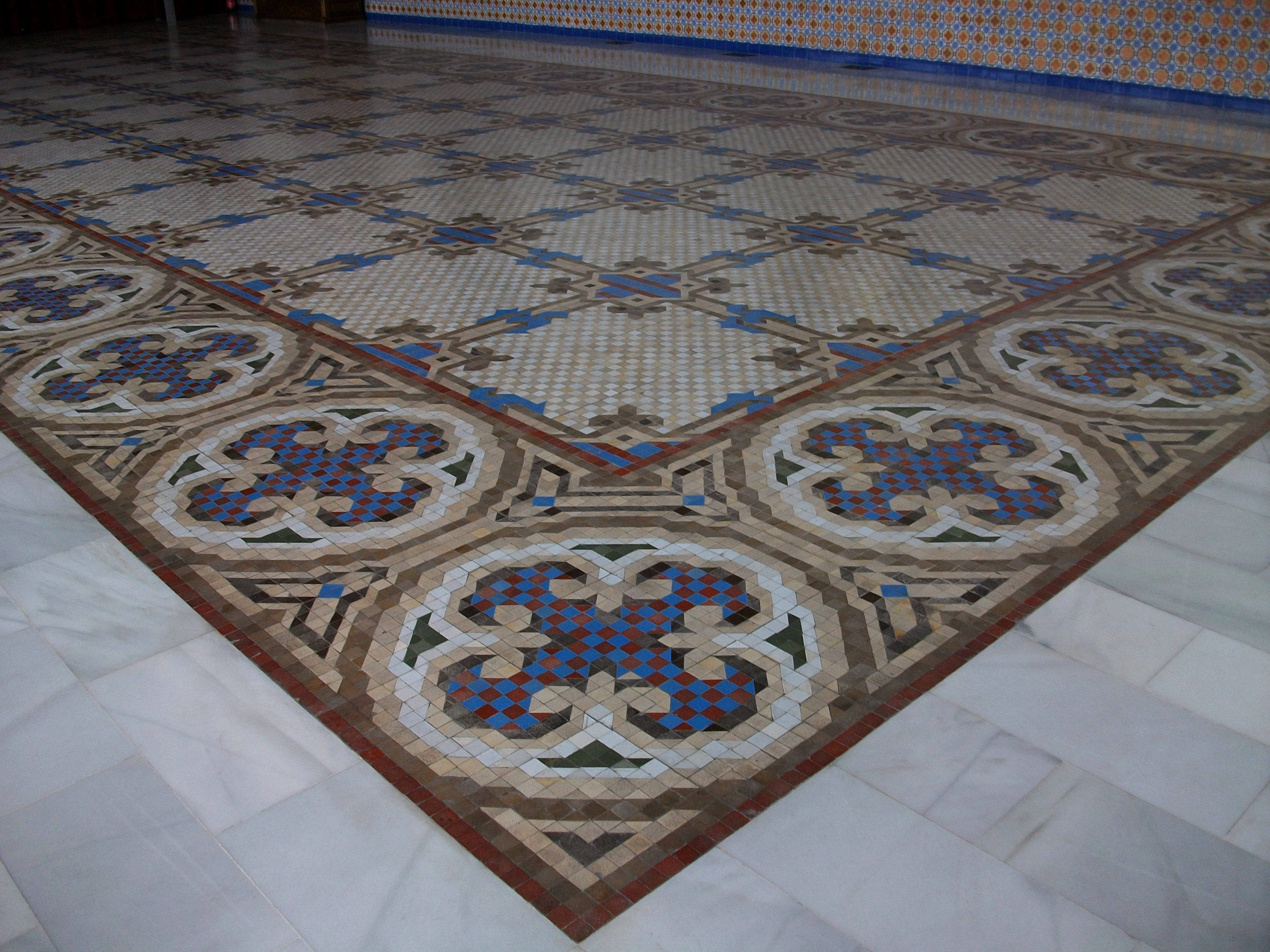 Sòl del gran saló del palau de l'Exposició, València. Mosaic Nolla.